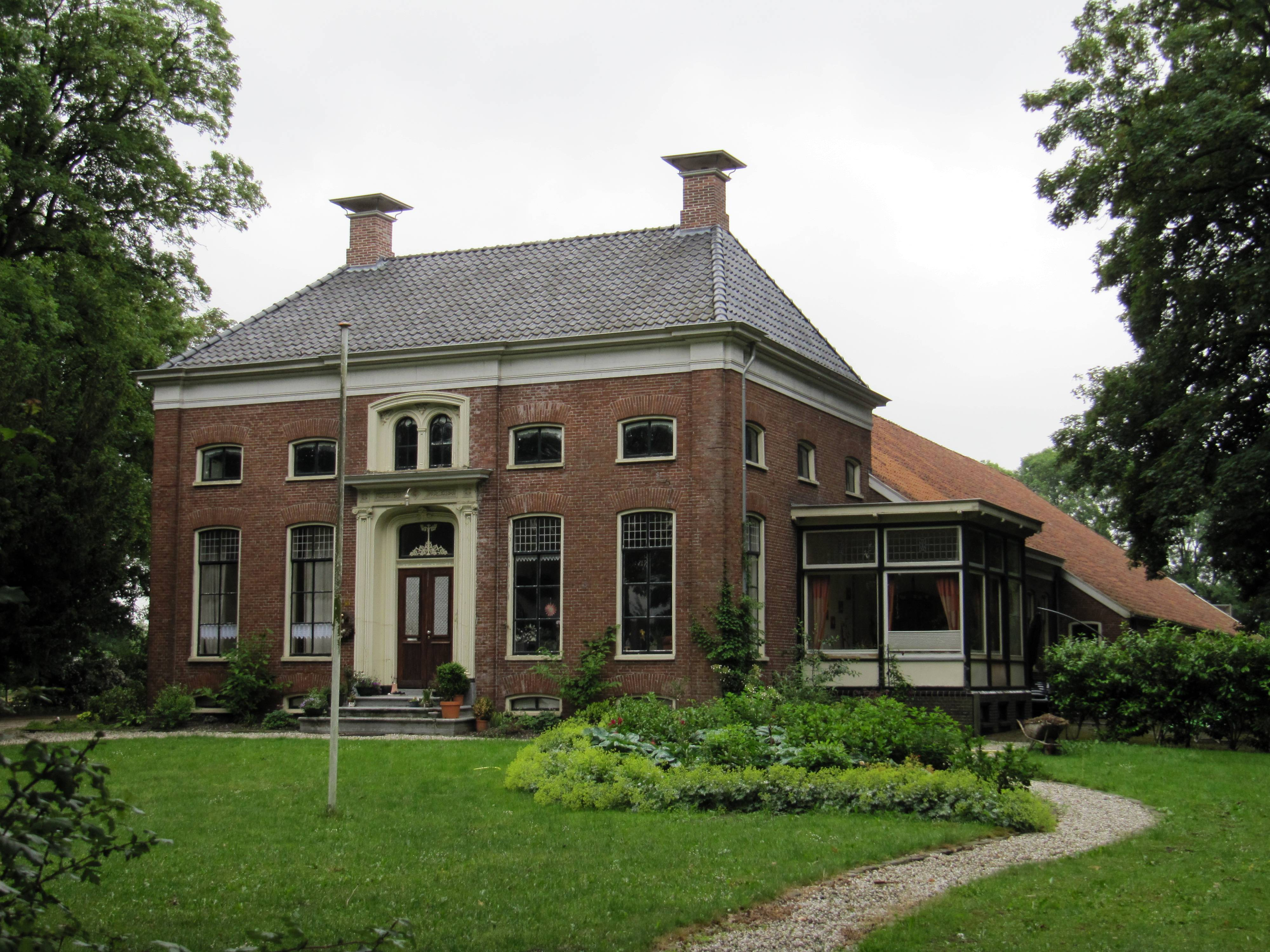 Oldambster dwarshuisboerderij in eclectische stijl gebouwd in 1872. De entree bevindt zich in het middenrisaliet van de voorgevel en bestaat uit twee houten paneeldeuren waarin gietijzeren roosters met bovenlicht met afgeronde hoeken waarin een gietijzeren levensboom; gepleisterde omlijsting van pilasters met Ionisch kapiteel en kroonlijst.